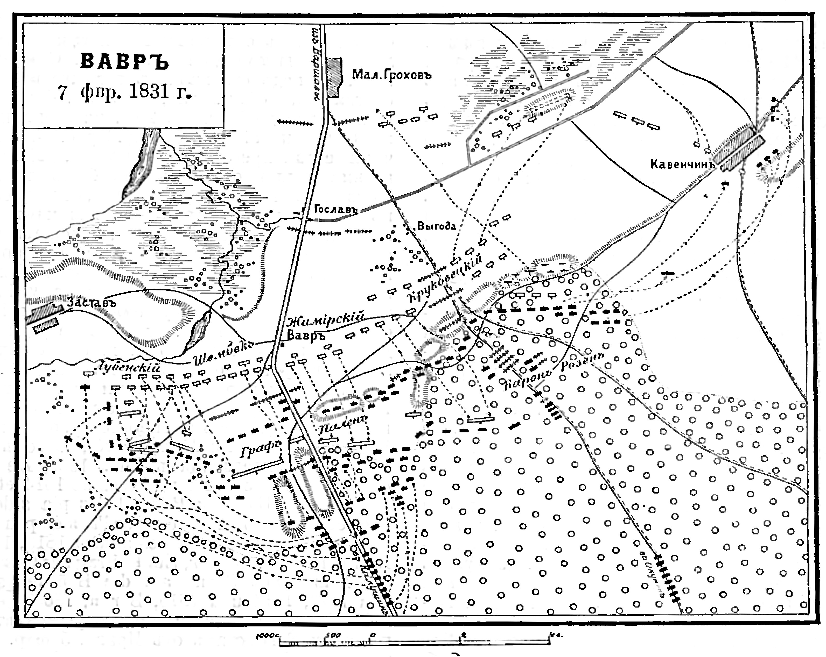 Данное изображение было использовано в статье «Вавр» опубликованной в пятом томе «Военной энциклопедии», который был издан книгоиздательским товариществом Ивана Дмитриевича Сытина в 1911 году в столице Российской империи городе Санкт-Петербурге.